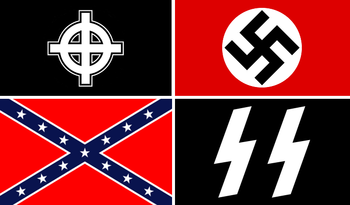 Drapeaux utilisés par différents mouvements d’extrême droite.